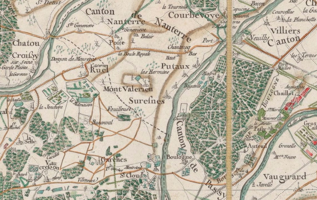 Feuille n°1 de la carte générale de France établie par Cassini. Exemplaire conservé à la BNF (exemplaire dit de Marie Antoinette)